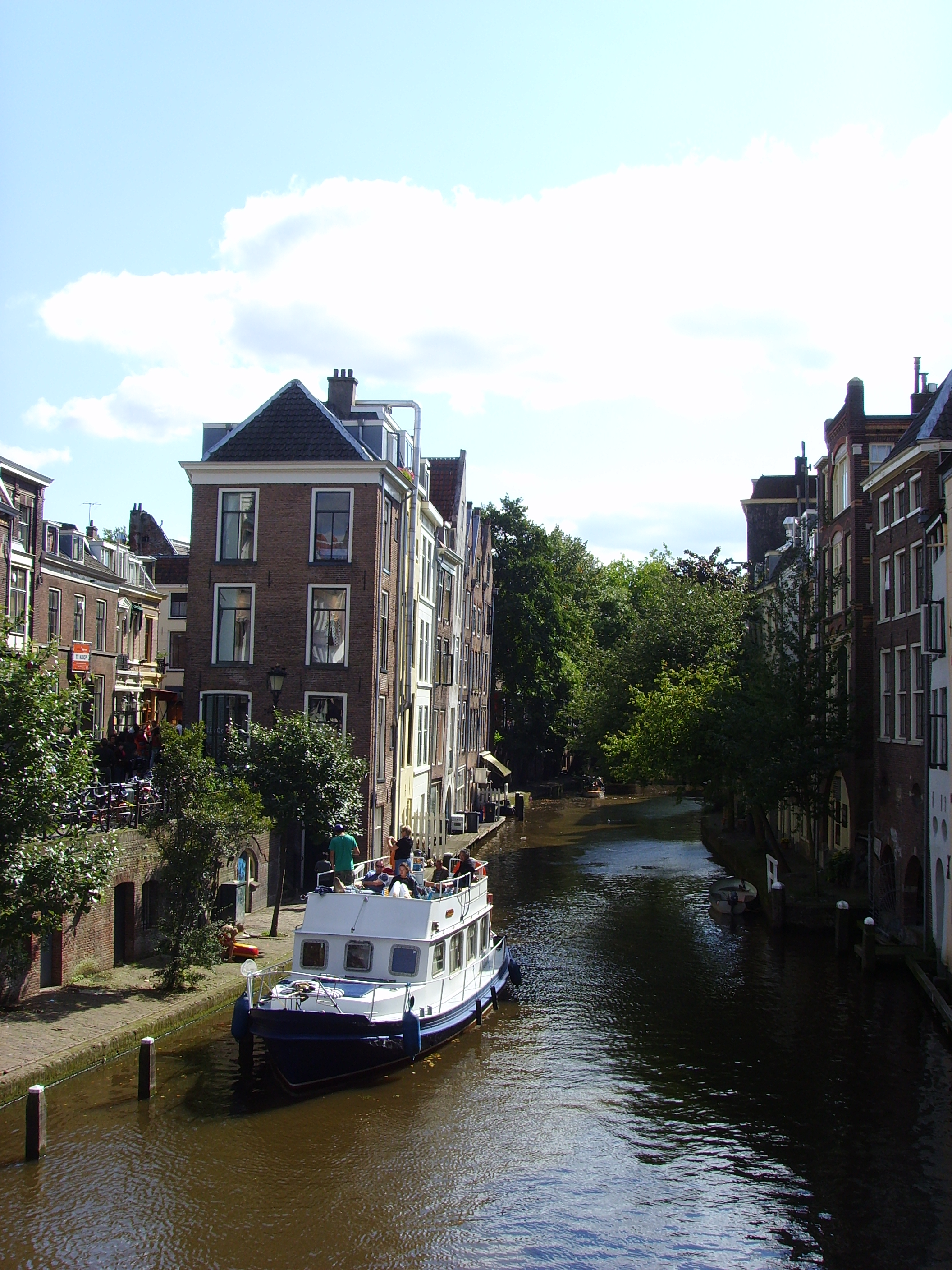 De Oudegracht in de Utrechtse binnenstad vanaf de Maartensbrug